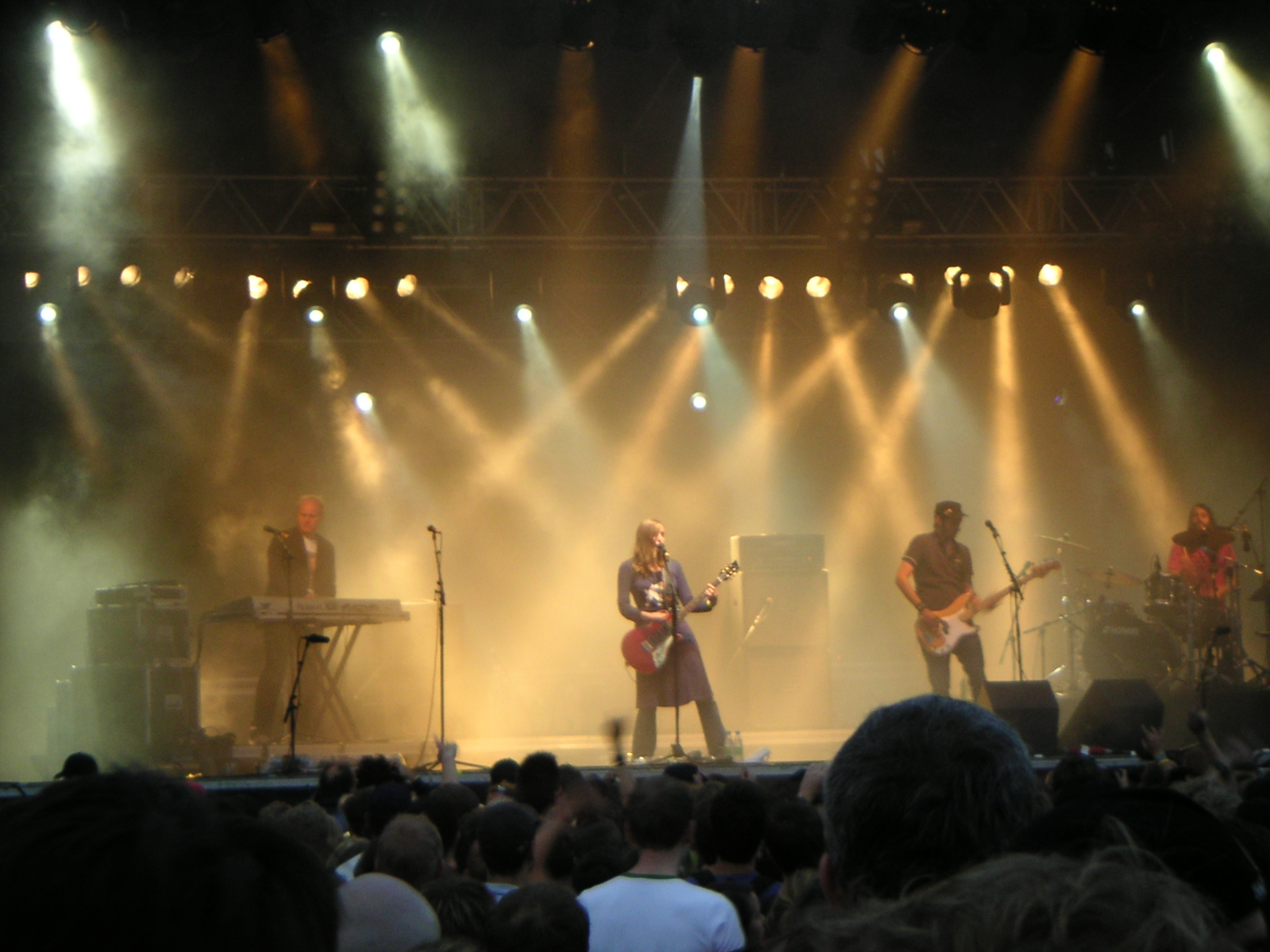 Wir sind Helden at Oben Ohne Open Air Festival 2005 in Munich